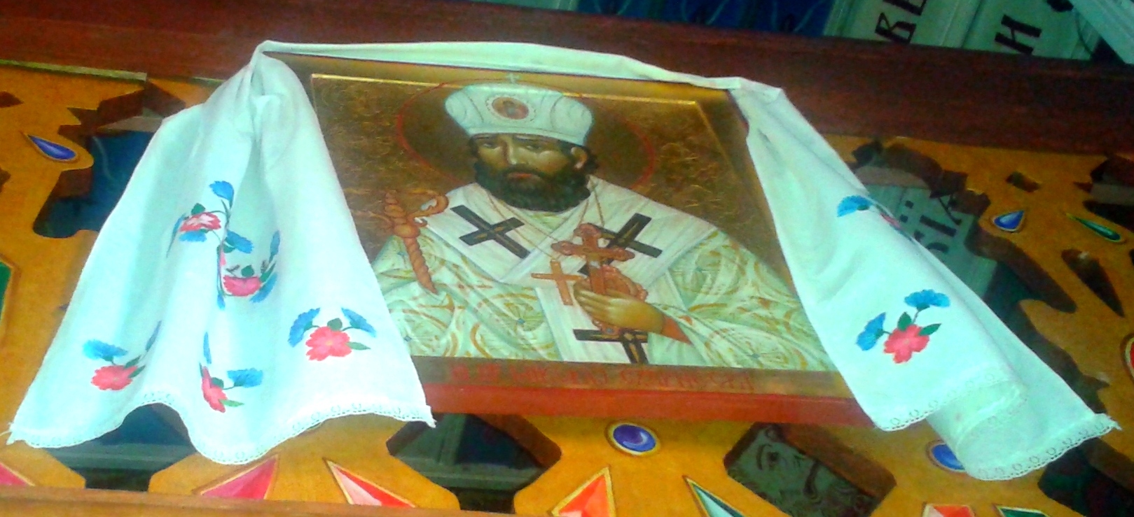 Ikona bł. Mikołaja Czarneckiego w cerkwi neounickiej w Kostomłotach